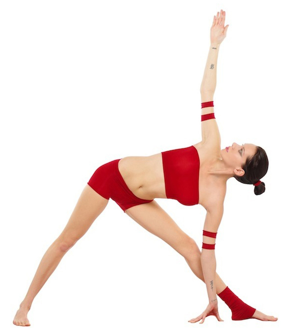 Trikonasana by Nina Mel, Yoga Teacher